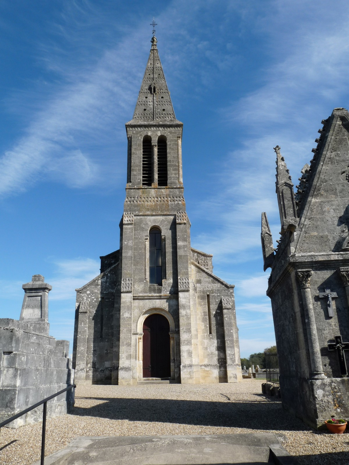 Eglise de Saint-Vivien-de-Blaye, Gironde, France